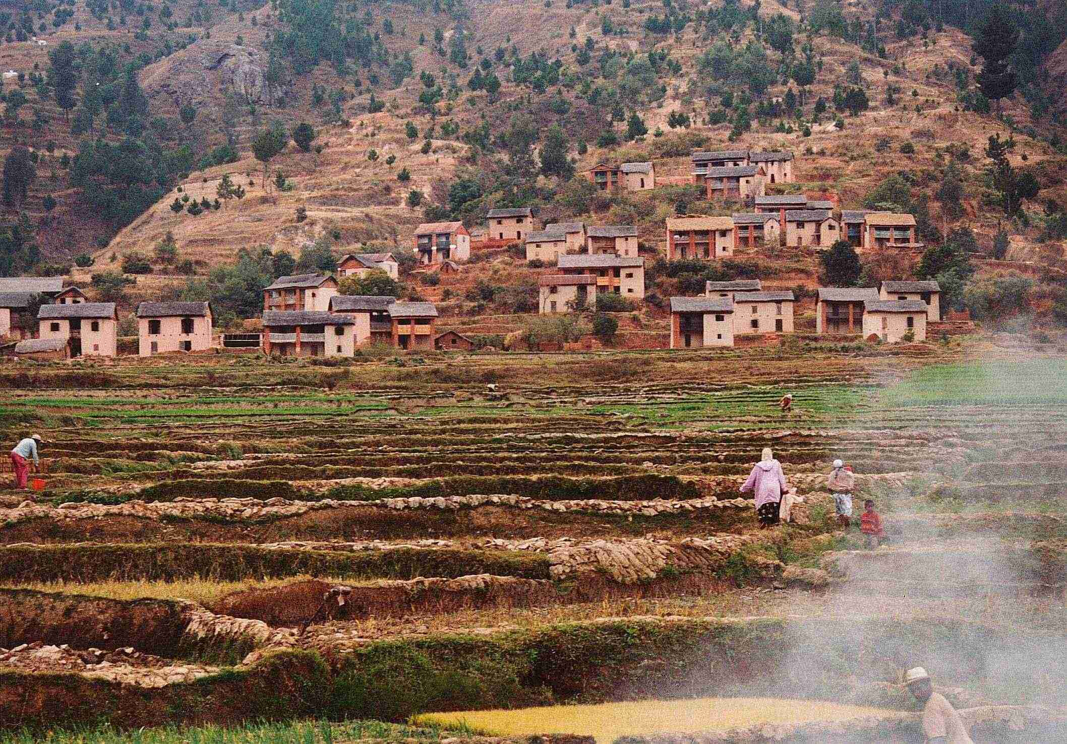 Rice cultivation near Antananarivo, Madagascar